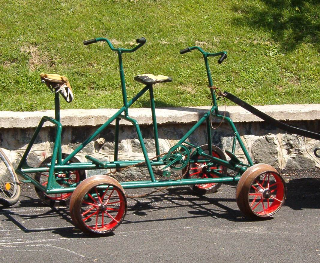 Дресина превозно средство